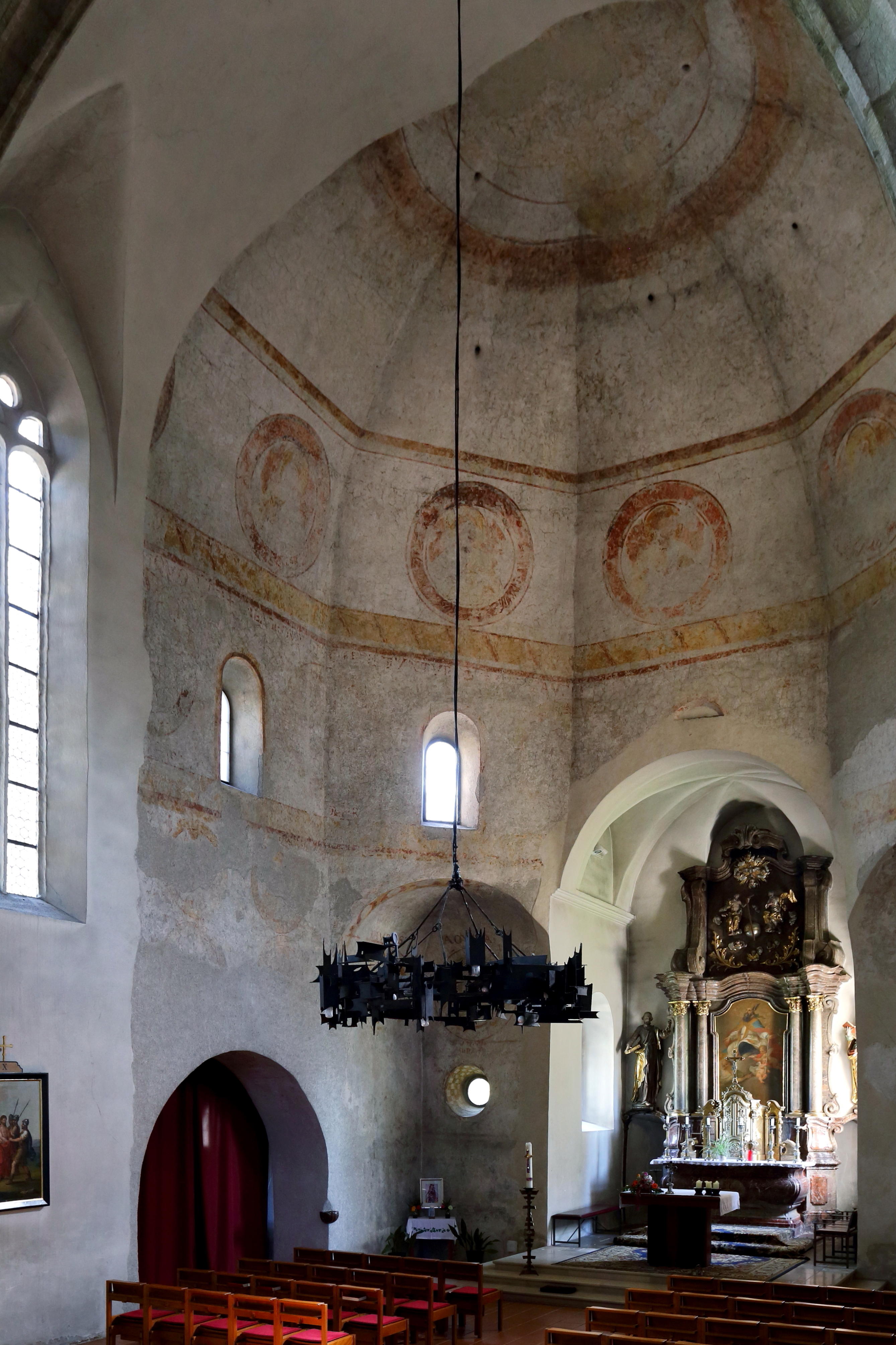 Der umgebaute ottonische Zentralbau mit quadratischem Grundriss sowie aufgesetztem Oktogon und jetziger Chor in der alten Pfarrkirche der niederösterreichischen Stadt Wieselburg. Der mächtige Radleuchter aus Stahl ist ein Werk von Franz Katzgraber (1926-1998) aus dem Jahr 1968.